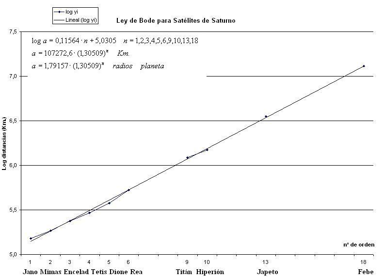 Ajuste logarítmico de las distancias de los satélites de Saturno. Origen de la imagen:[1]